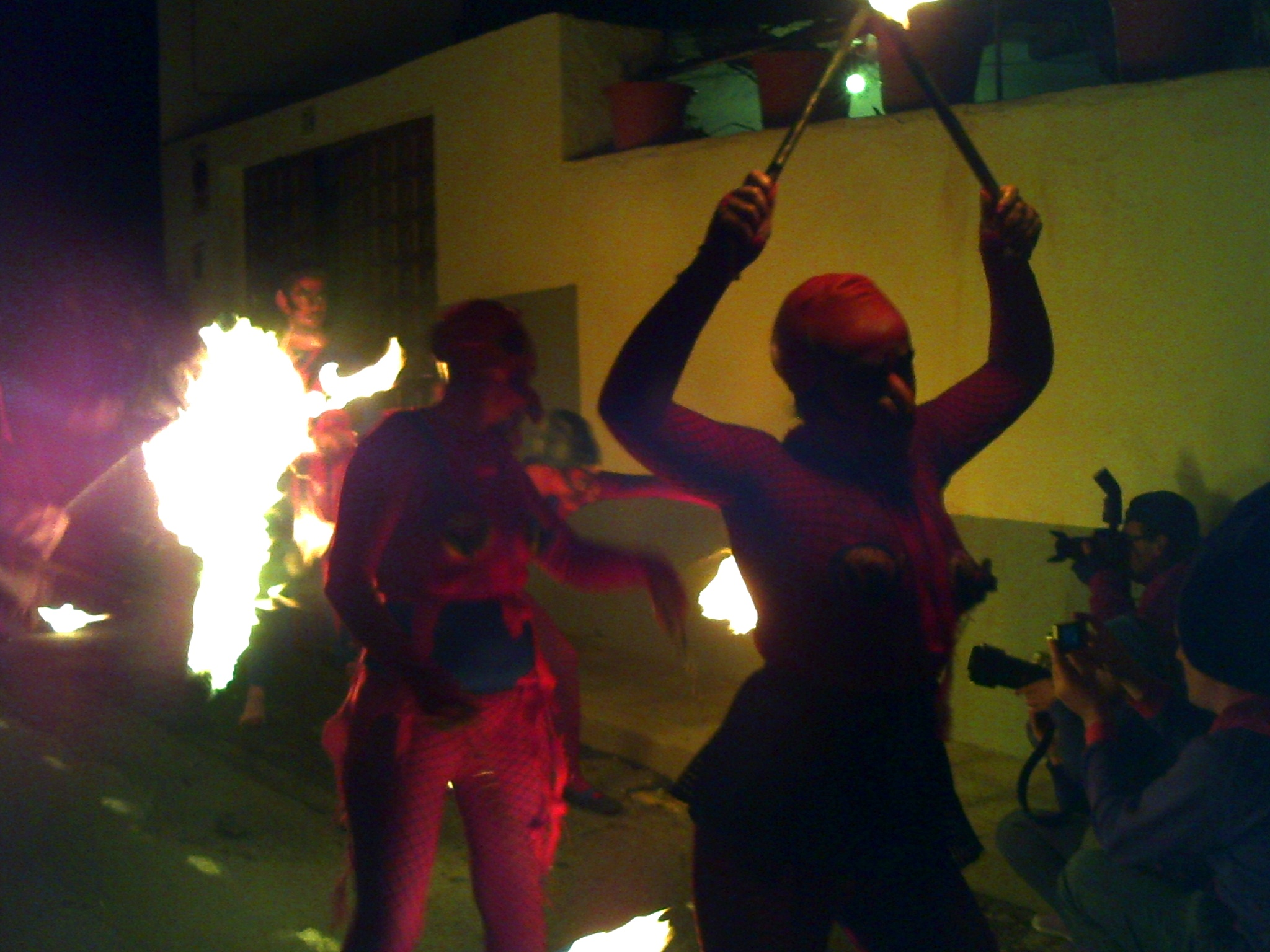 Burras de Güimar en el entierro de la sardina.